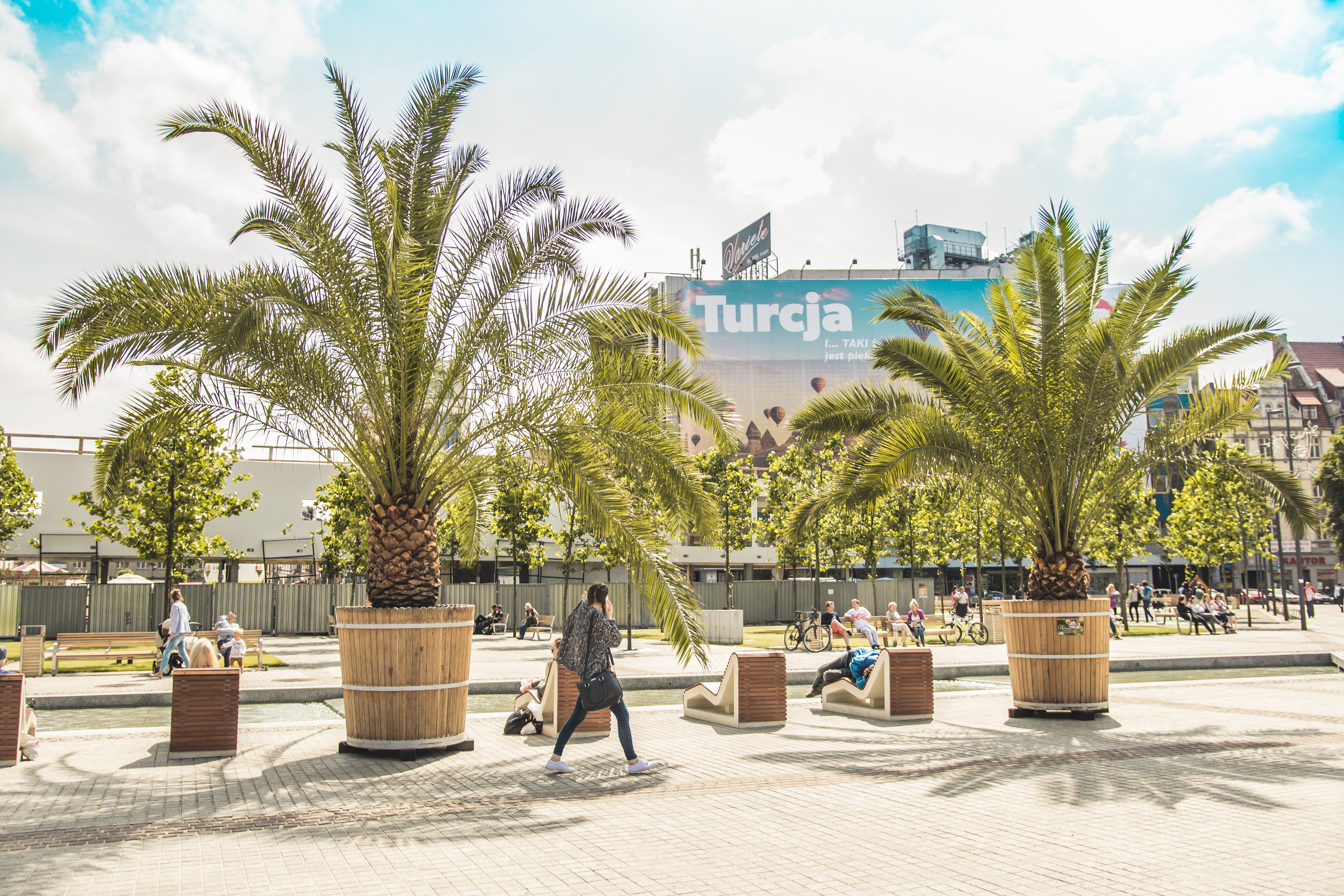 Palmy na rynku w Katowicach